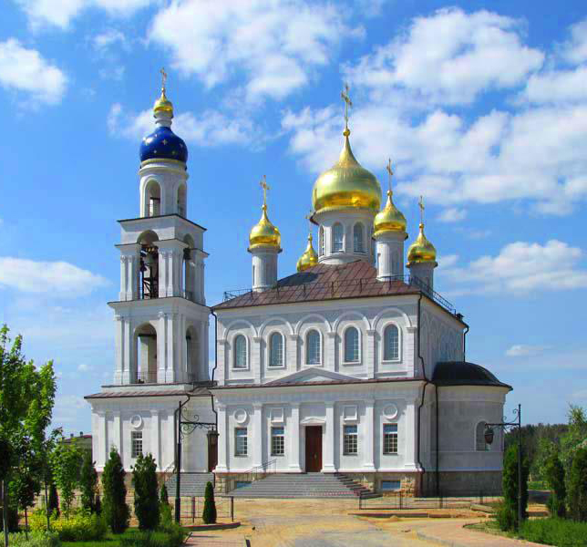 Снимок церкви сделан в поселке Монолит